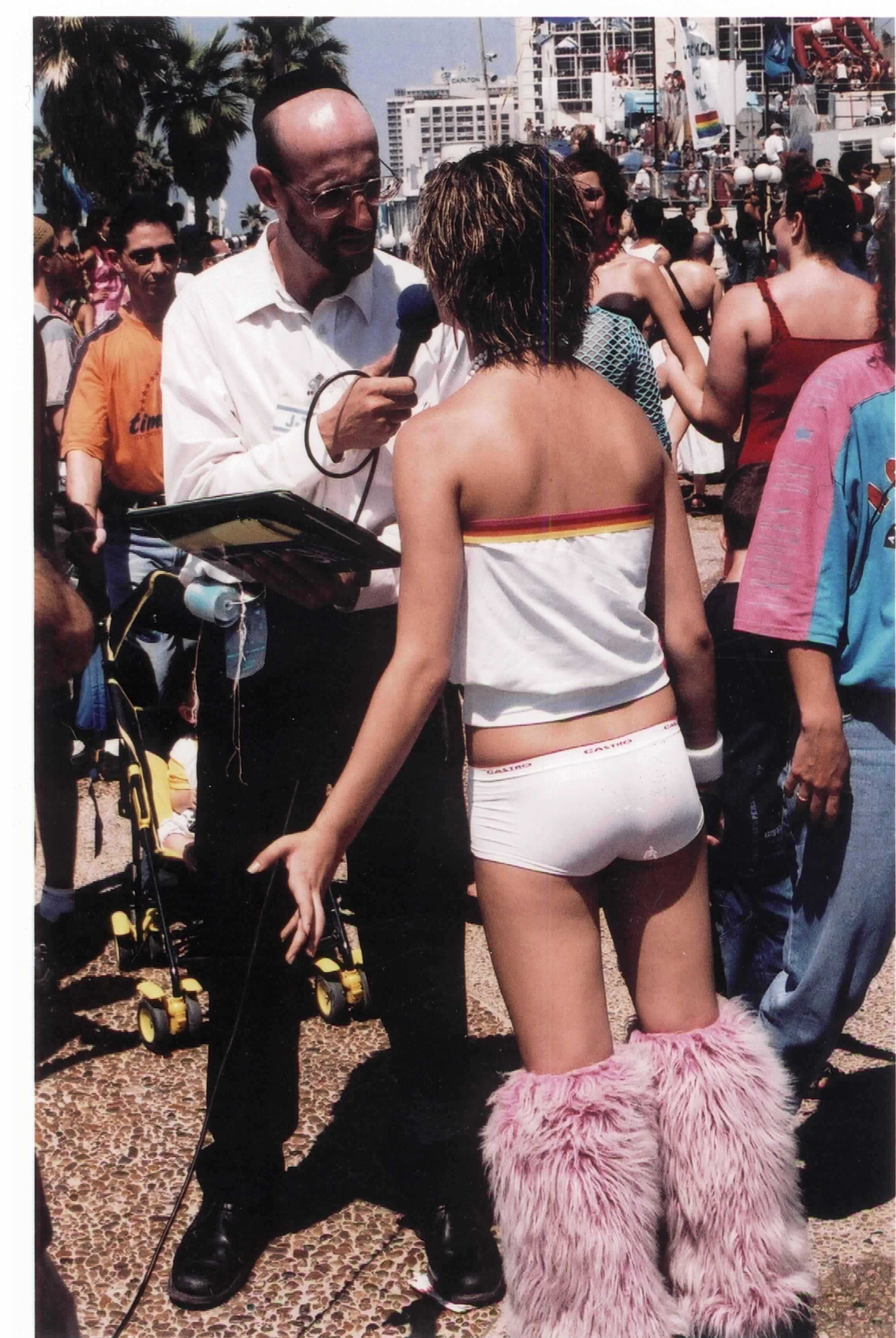 ערן שדר מתוך הפינה JTV -בערוץ ביפ